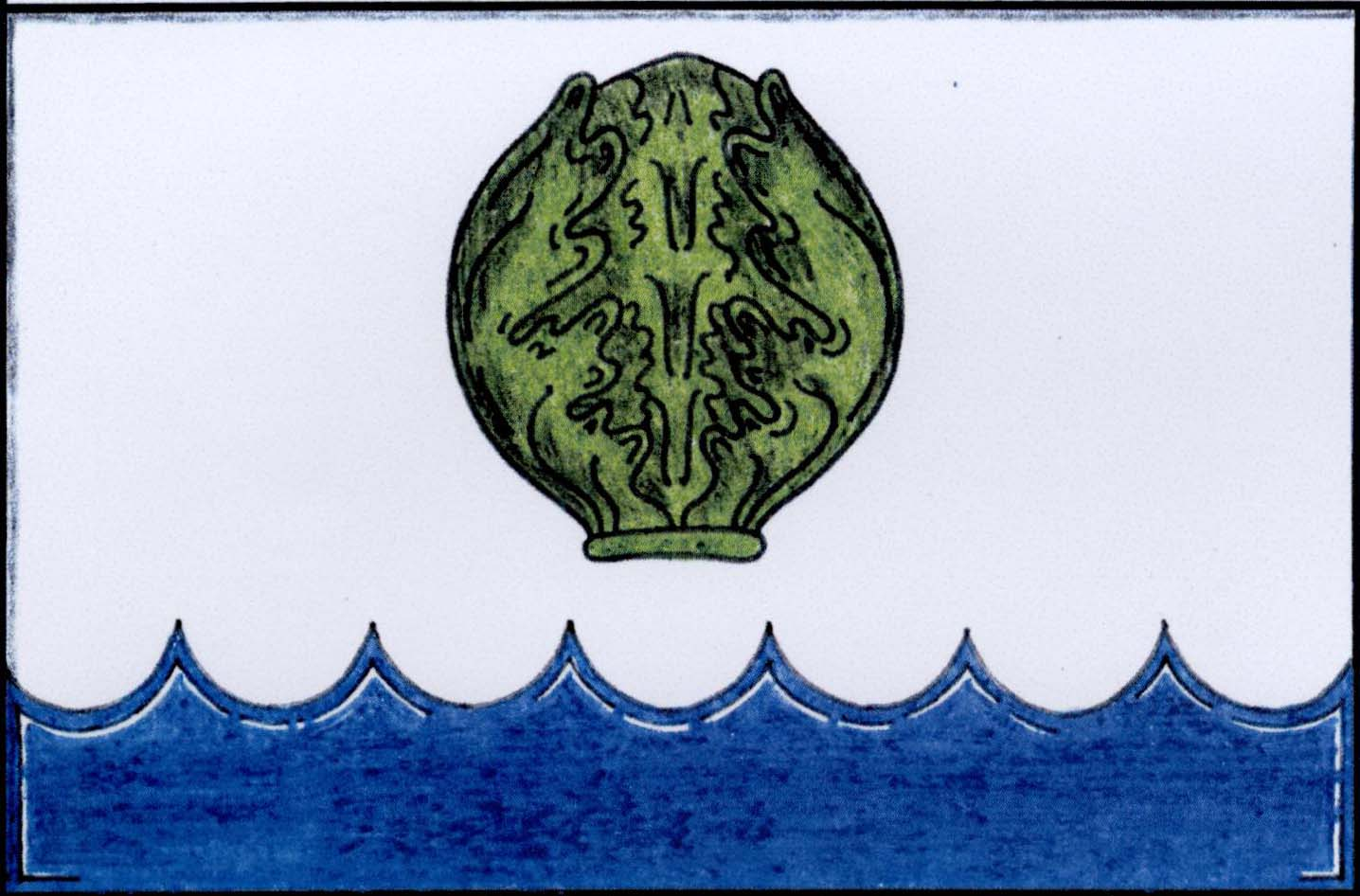 Česky: vlajka obce Roudné